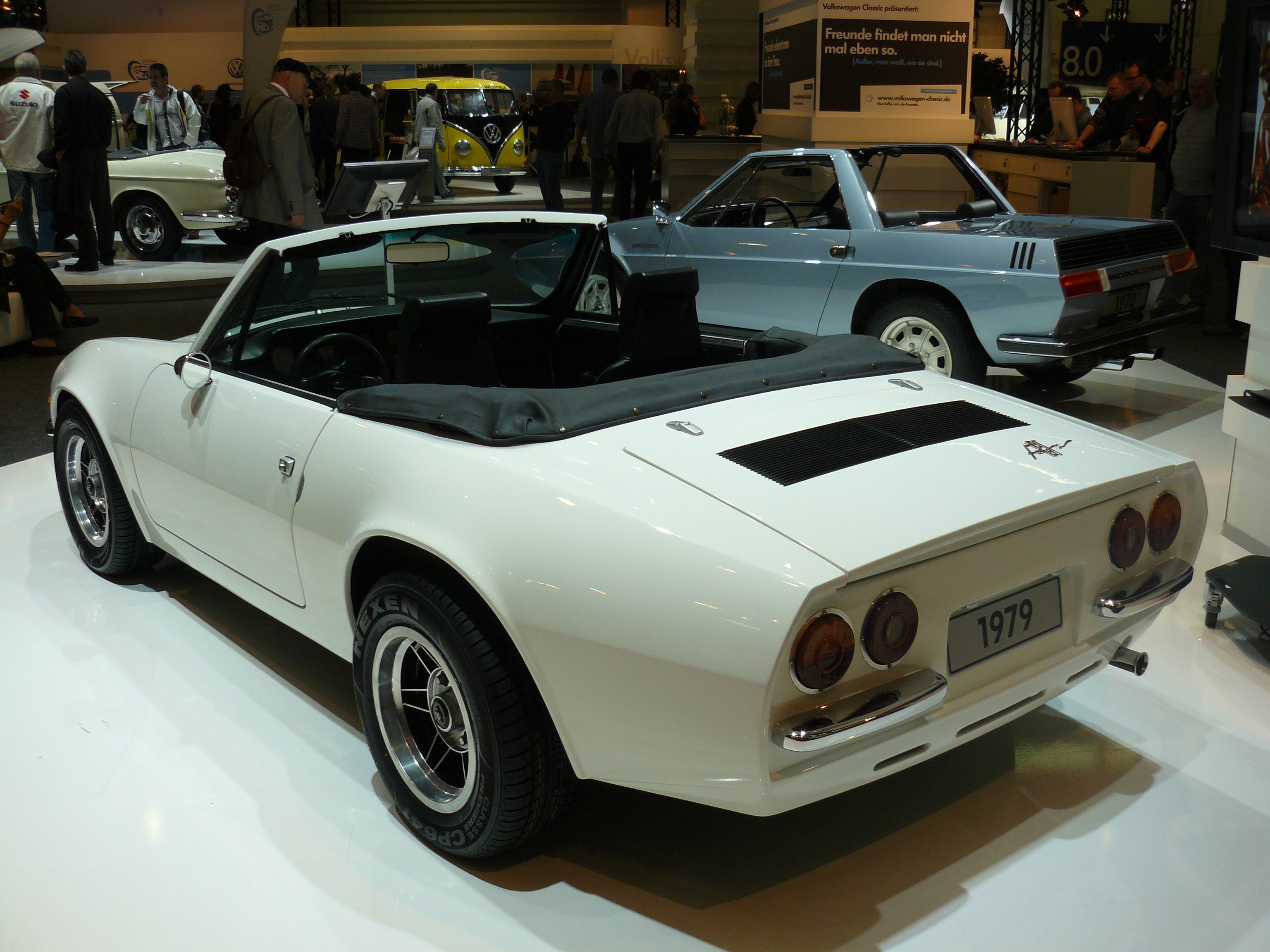 Essen 2011